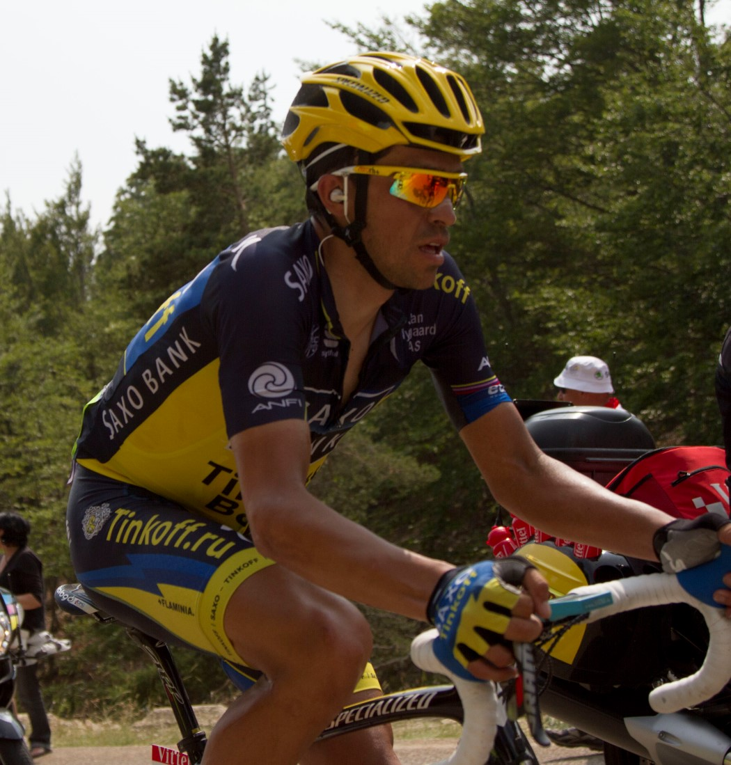 028 contador